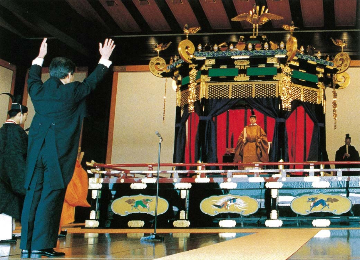 内閣総理大臣は、正殿内において、寿詞(よごと)を述べ、万歳を三唱した